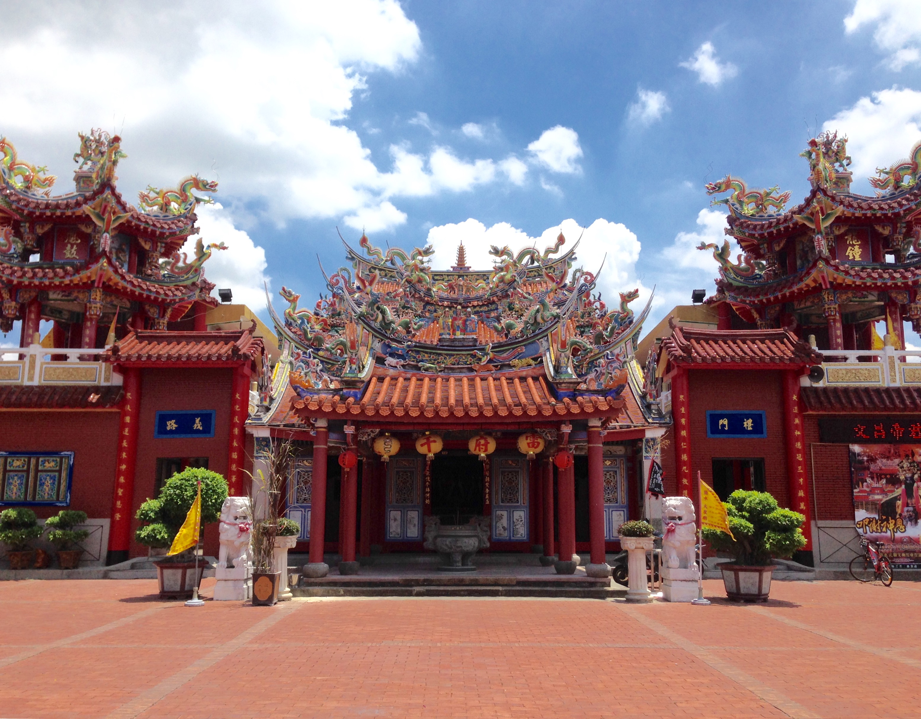 鹽水大眾廟